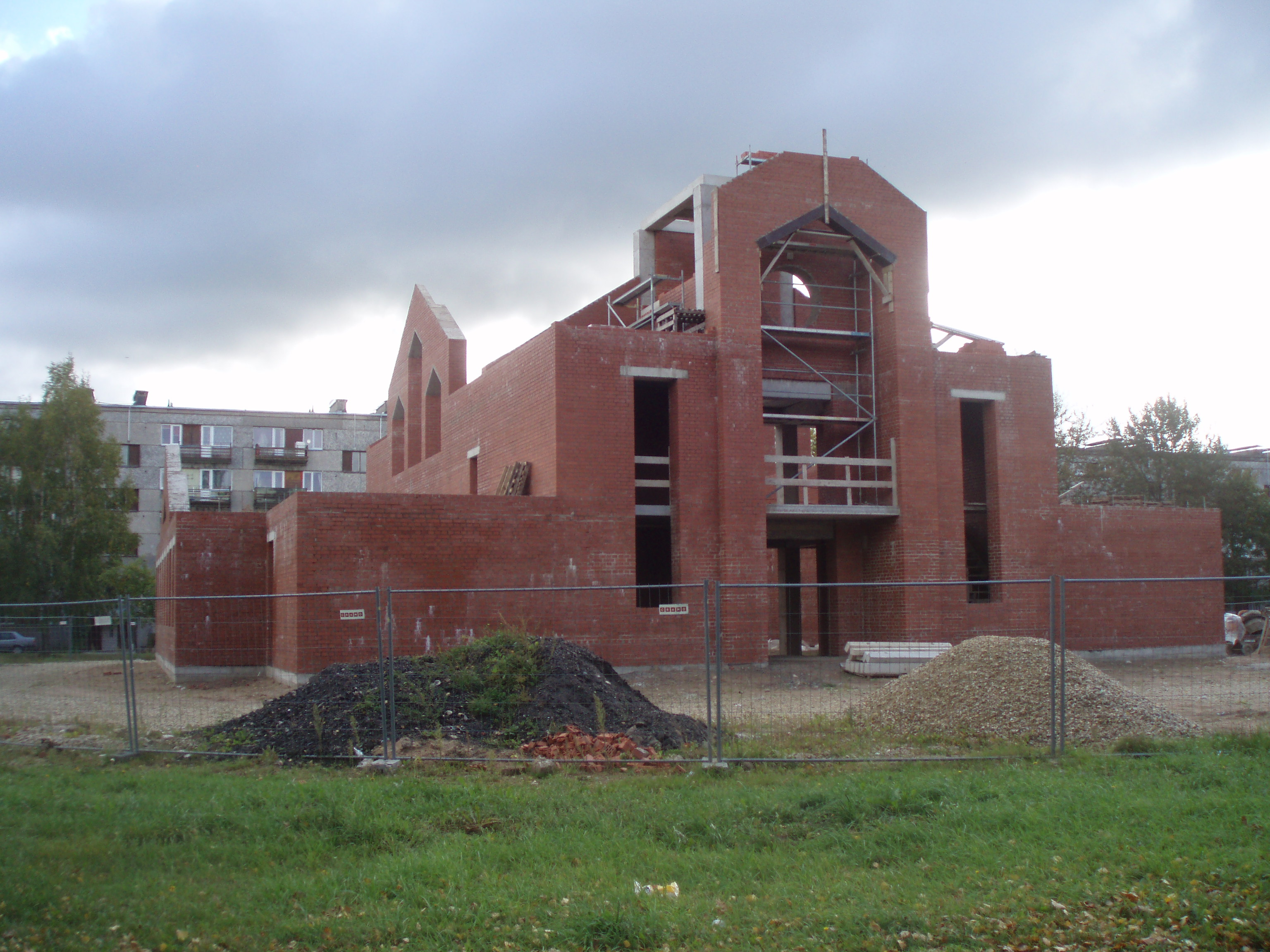 Rēzeknes Dieva Žēlsirdības Romas katoļu baznīca